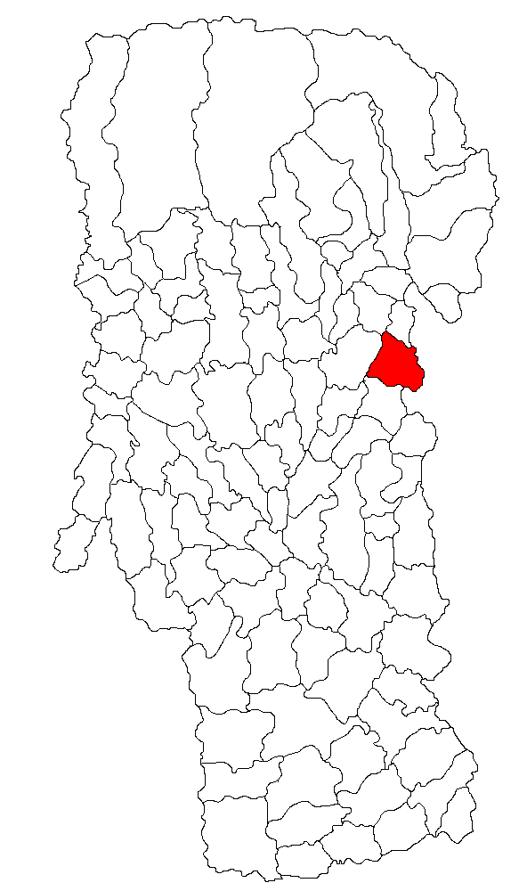 Categorie:Hărţi ale judeţului Argeş